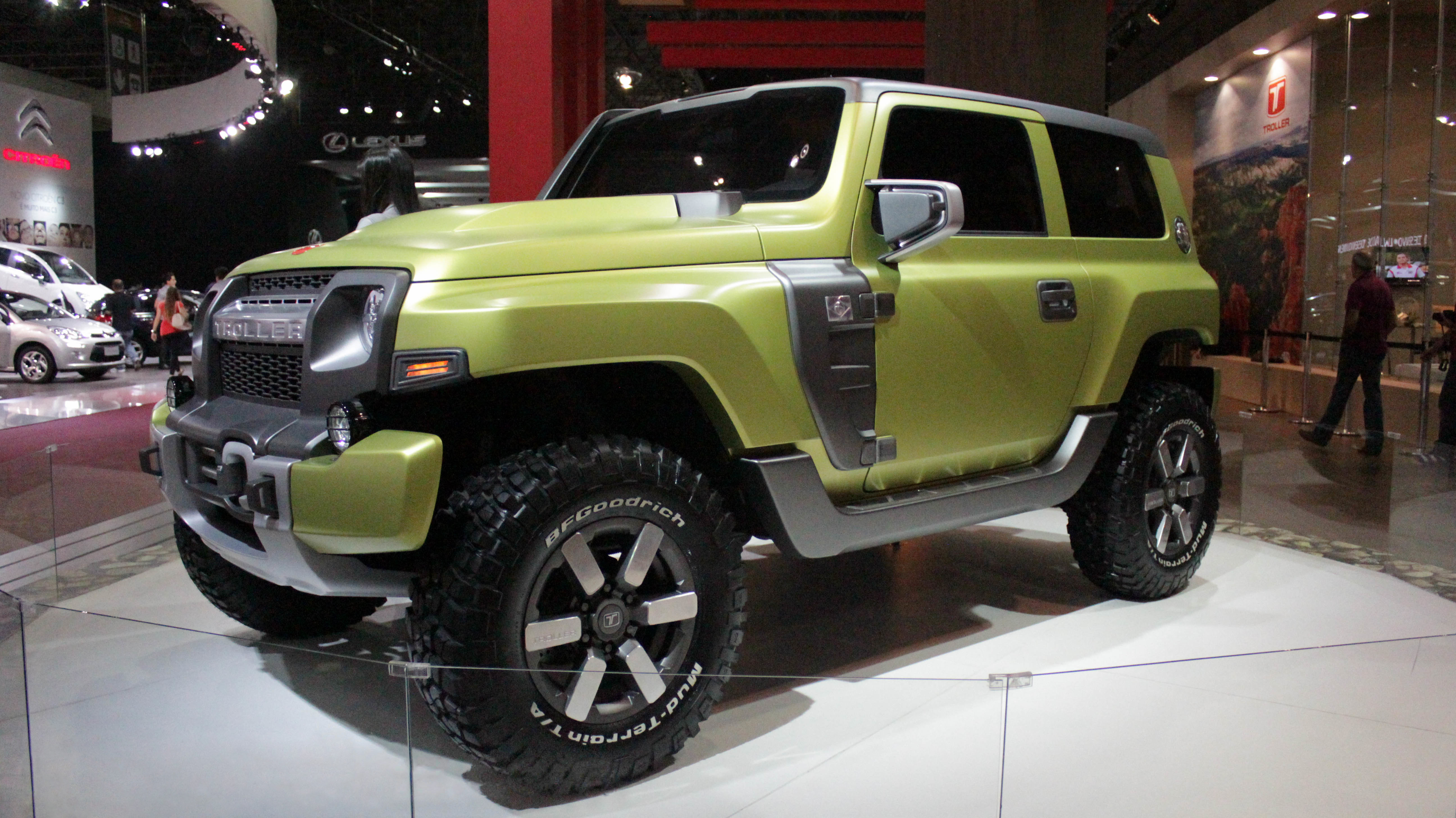 Troller Conceito TR-X